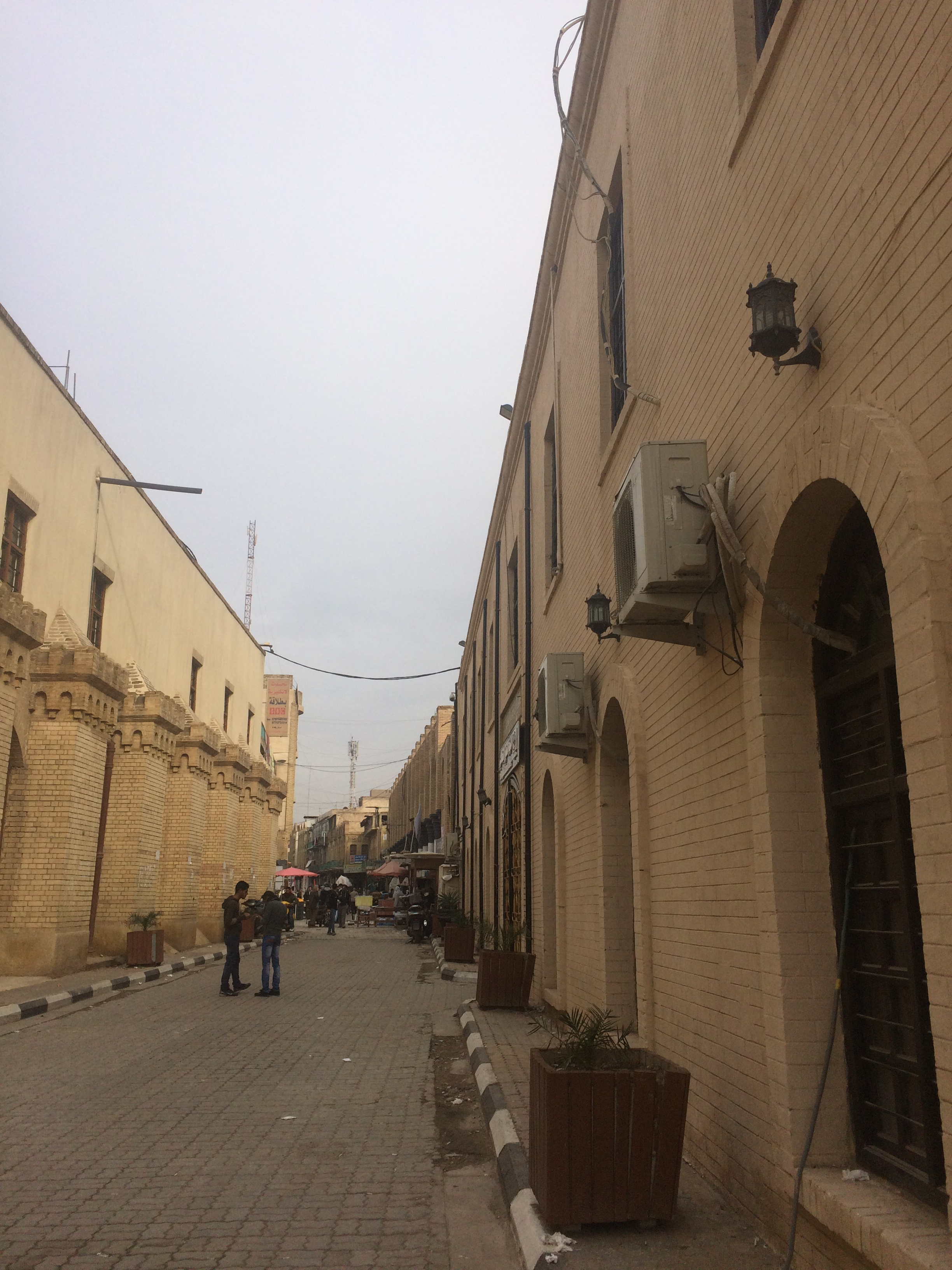 منظر في نهاية شارع المتنبي في بغداد قرب مبنى القشلة العثماني